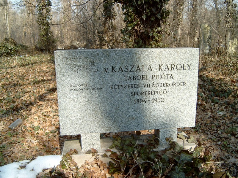 Kaszala Károly (1894-1932) sportrepülő, tábori pilóta, kétszer - 1927-ben és 1928-ban - világrekorder, oktató. Urbaschek János (mérnök, repülőgép-szerelővel) repülőbaleset áldozata lett. Kerepesi temető: 47-10-1